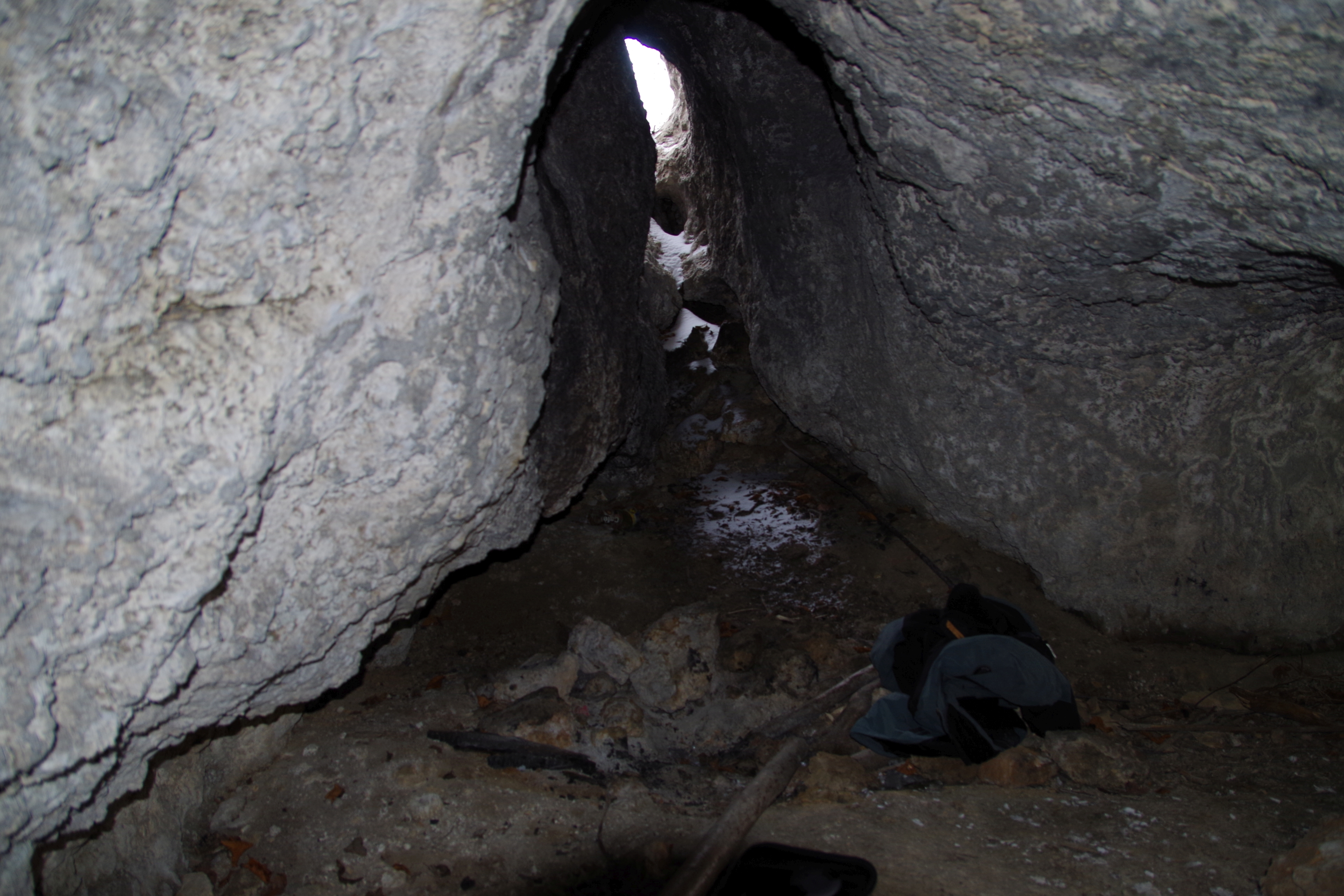 Schronisko Południowe. Korytarz wejściowy